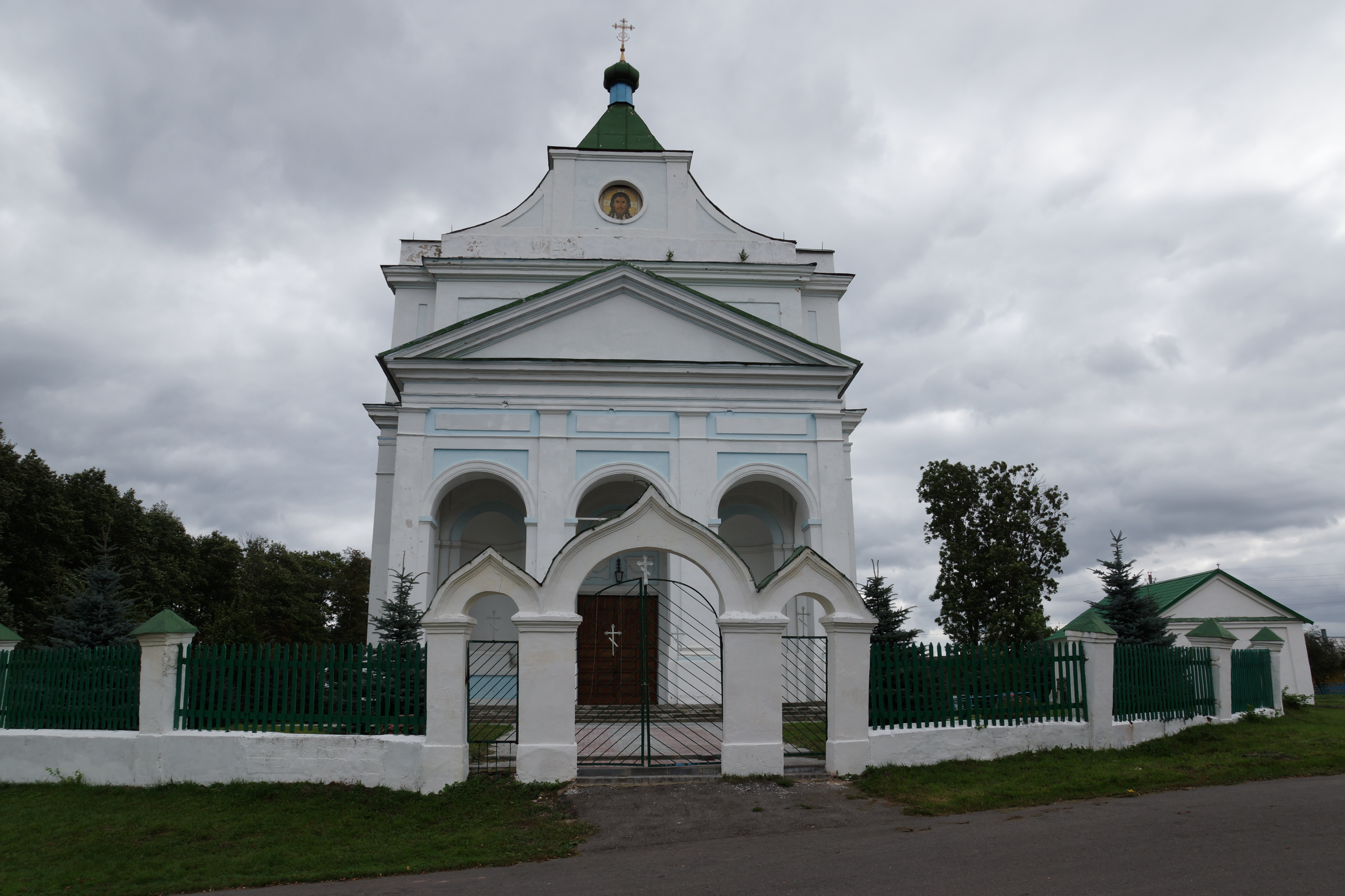 Беларуская (тарашкевіца): Дзьмітрыеўская царква з брамай і домам старасты. в. Шчорсы This is a photo of Belarusian heritage monument. Reference number: 412Г000468 ( WLM)